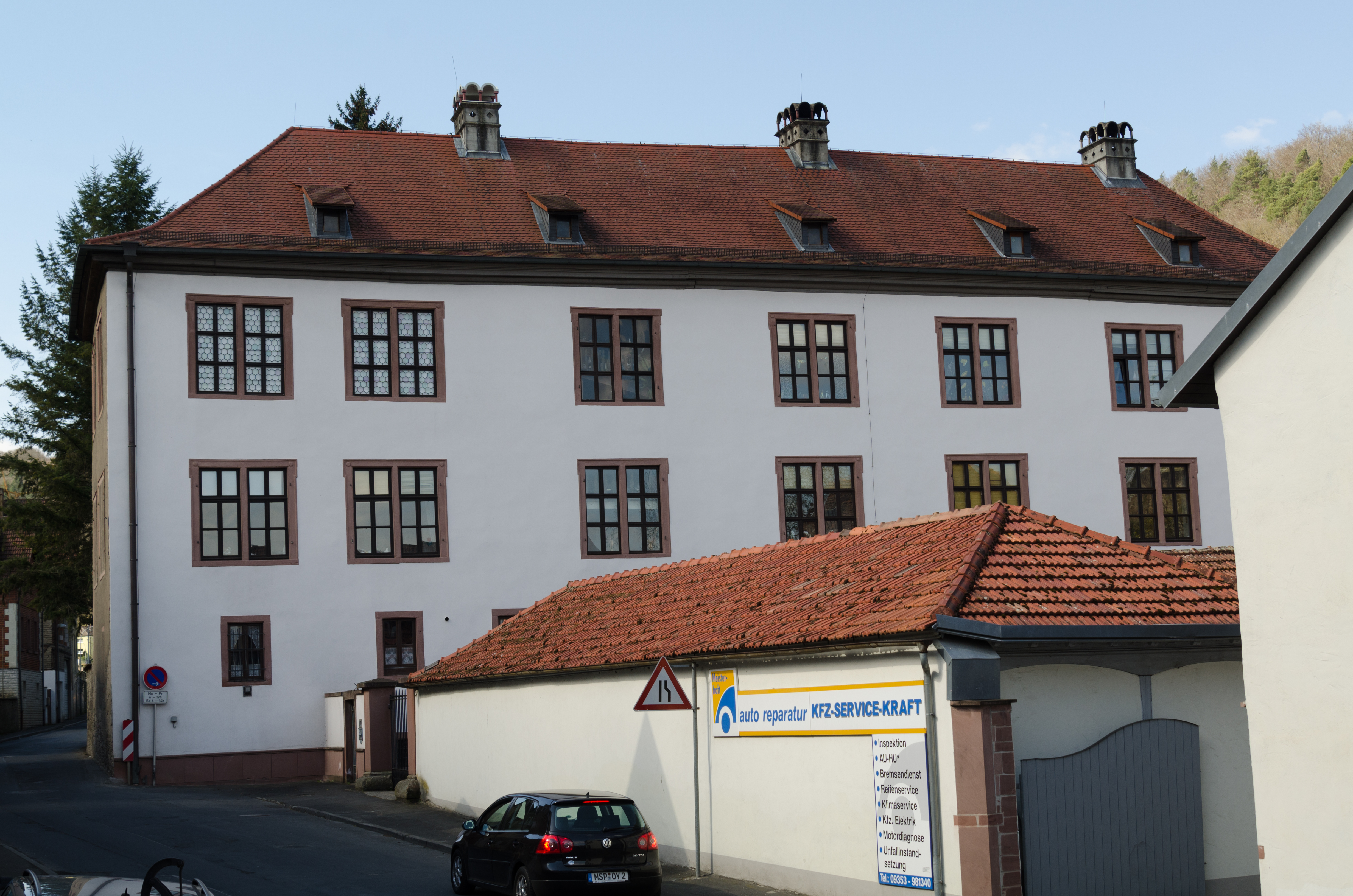 Karlstadt, Mühlbach, Stadelhofer Straße 10